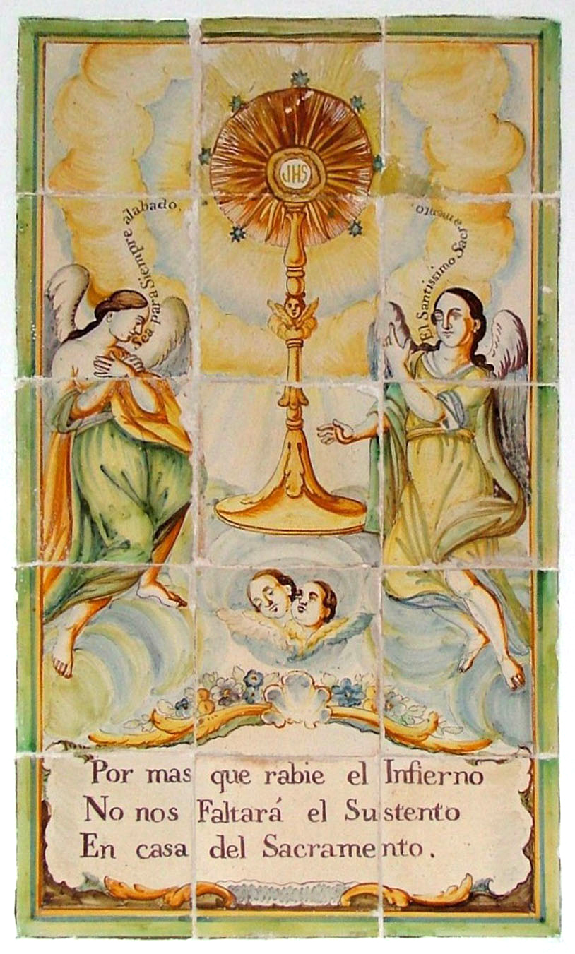 Azulejo fundacional del Monasterio de Capuchinas de AlicanteIncludes JHS monogram.